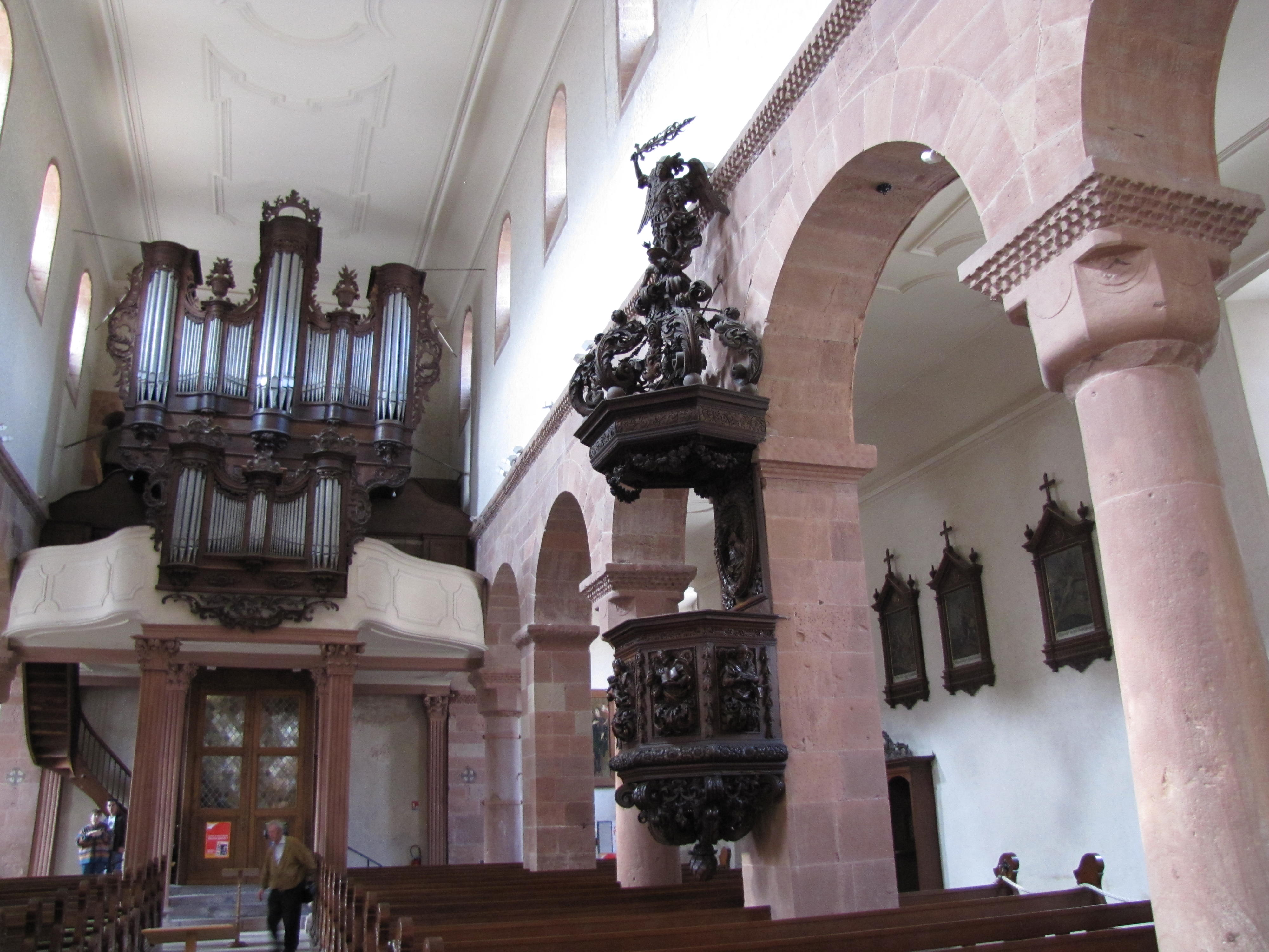 Alsace, Haut-Rhin, Collégiale Saints-Michel et Gangolphe de Lautenbach (PA00085503, IA00054819). Nef avec chaire à prêcher et orgue de tribune Toussaint (XVIIIe)